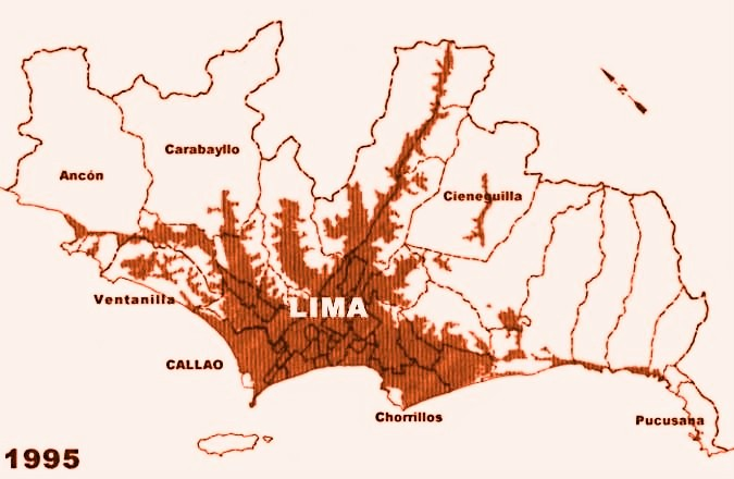 Lima 1995 El que suscribe, autor del plano de Lima 1995, expresa su deseo de publicar dicha imagen en Wikipedia --Edgardo Reyes 20:58 28 feb, 2005 (CET) Categoría:Mapas del Perú (imagen)